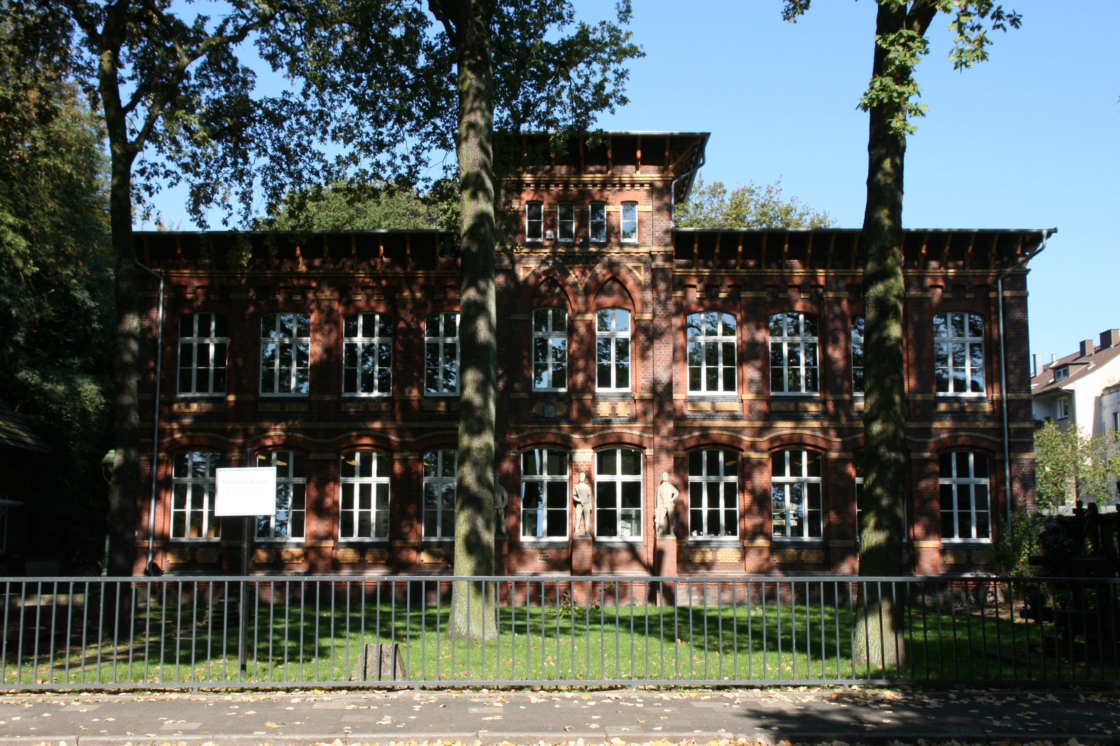 Heimat- und Naturkunde-Museum Wanne-Eickel, Unser-Fritz-Straße 108 in Herne